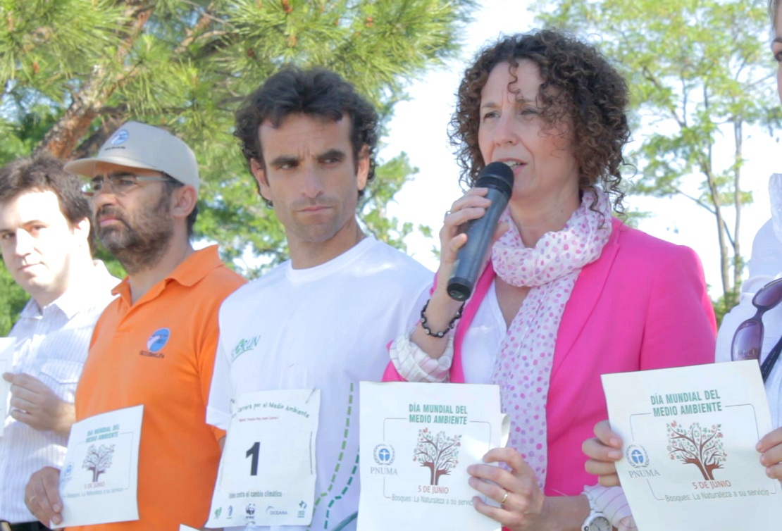 Directora General Oficina de Cambio Climático, Alicia Montalvo y Premio Principe de Asturias Fabián Roncero con miembros de ONG